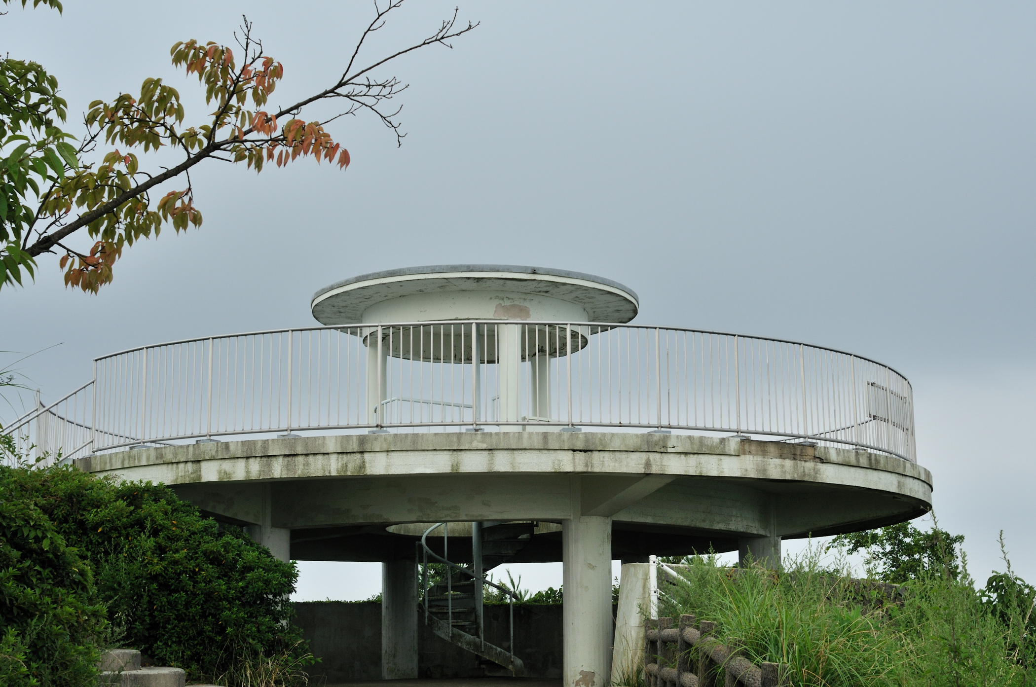 広島県呉市の灰ヶ峰山頂にある展望台です。旧日本軍の高射砲があった所です